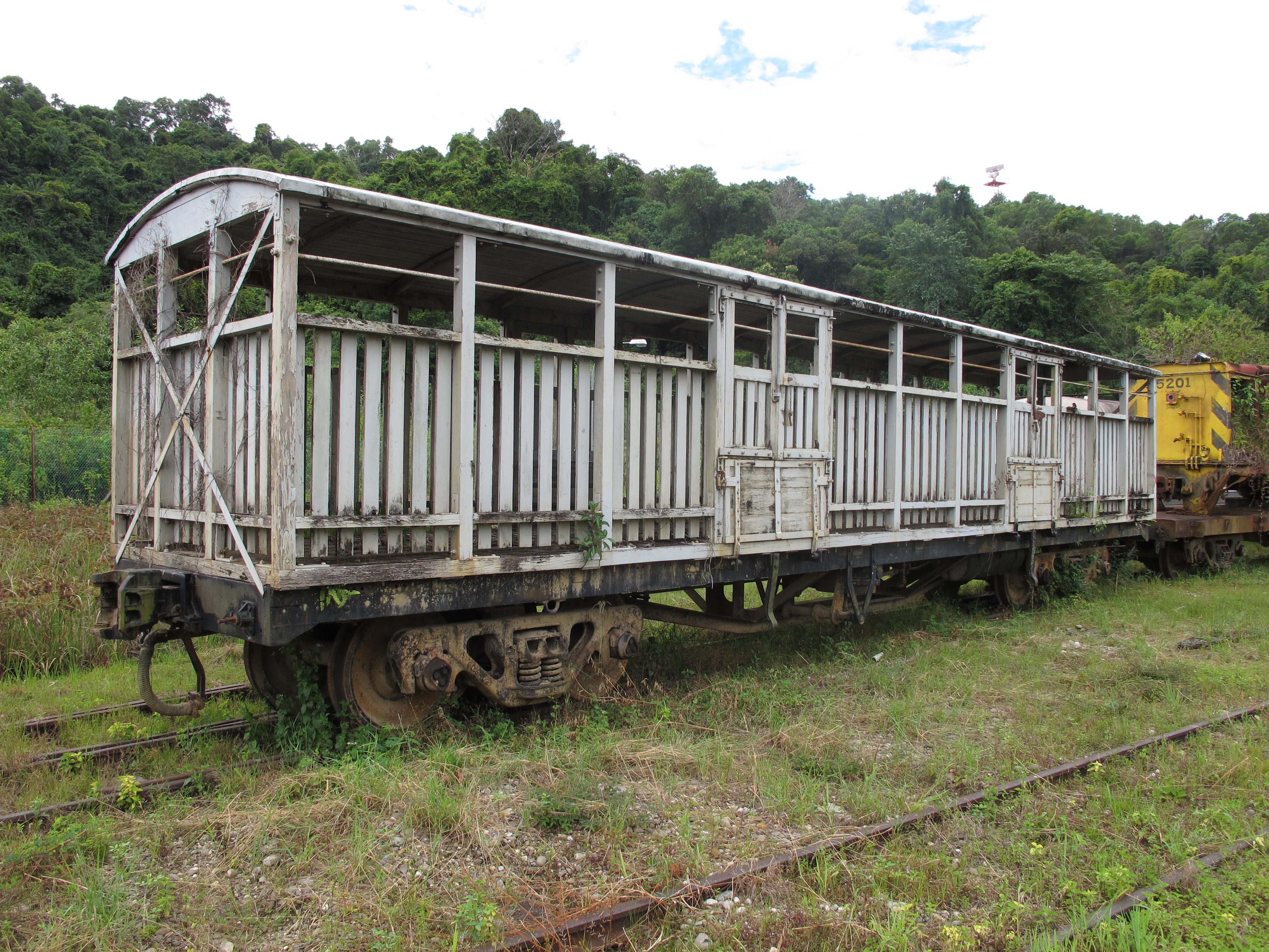 Viehwaggon der North Borneo Railways, photographiert vor dem Depot in Tg Aru